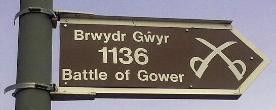 Arwydd Garn Goch